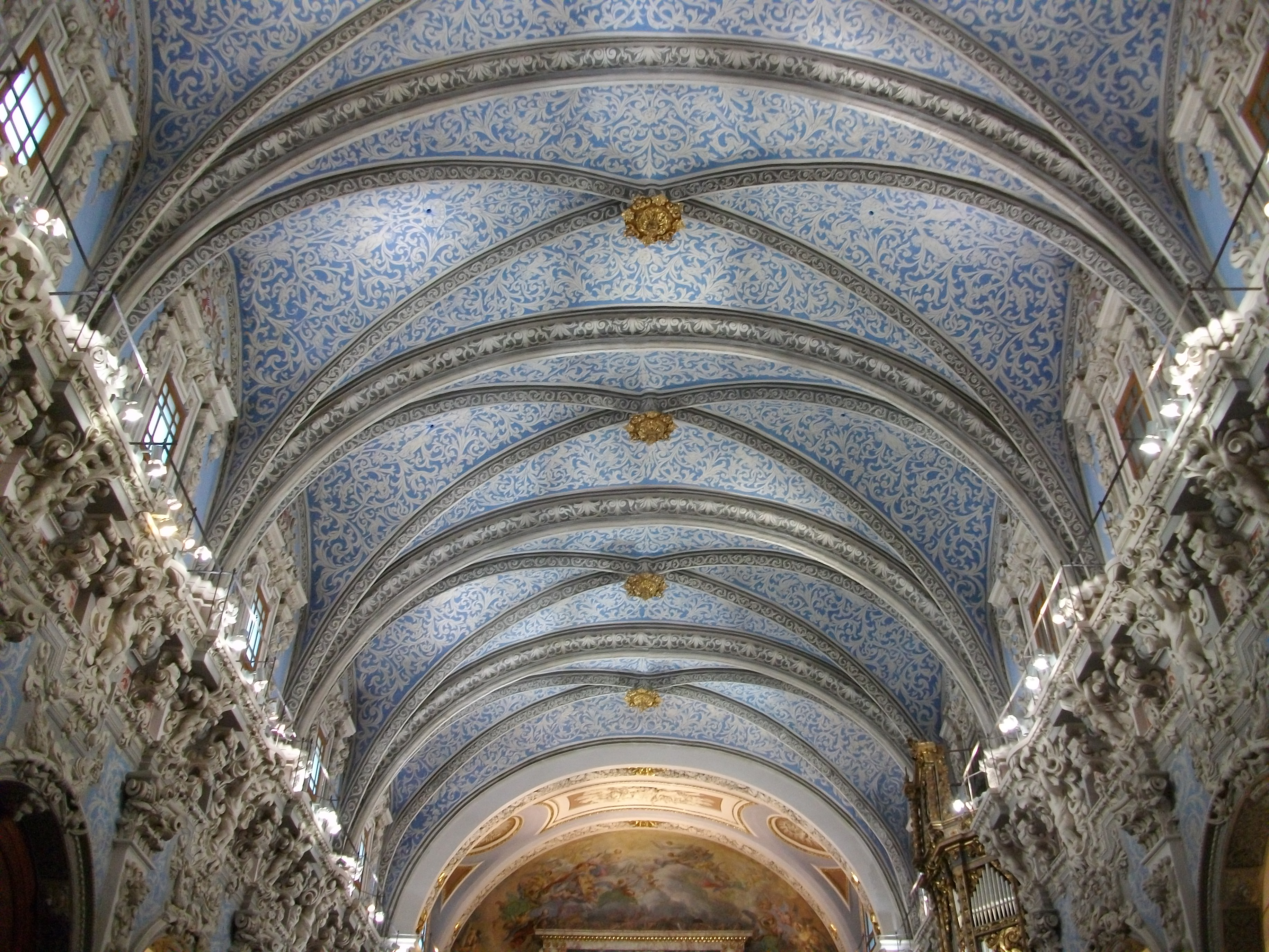 Voltes de l'església de Sant Esteve de València, l'Horta, País Valencià.